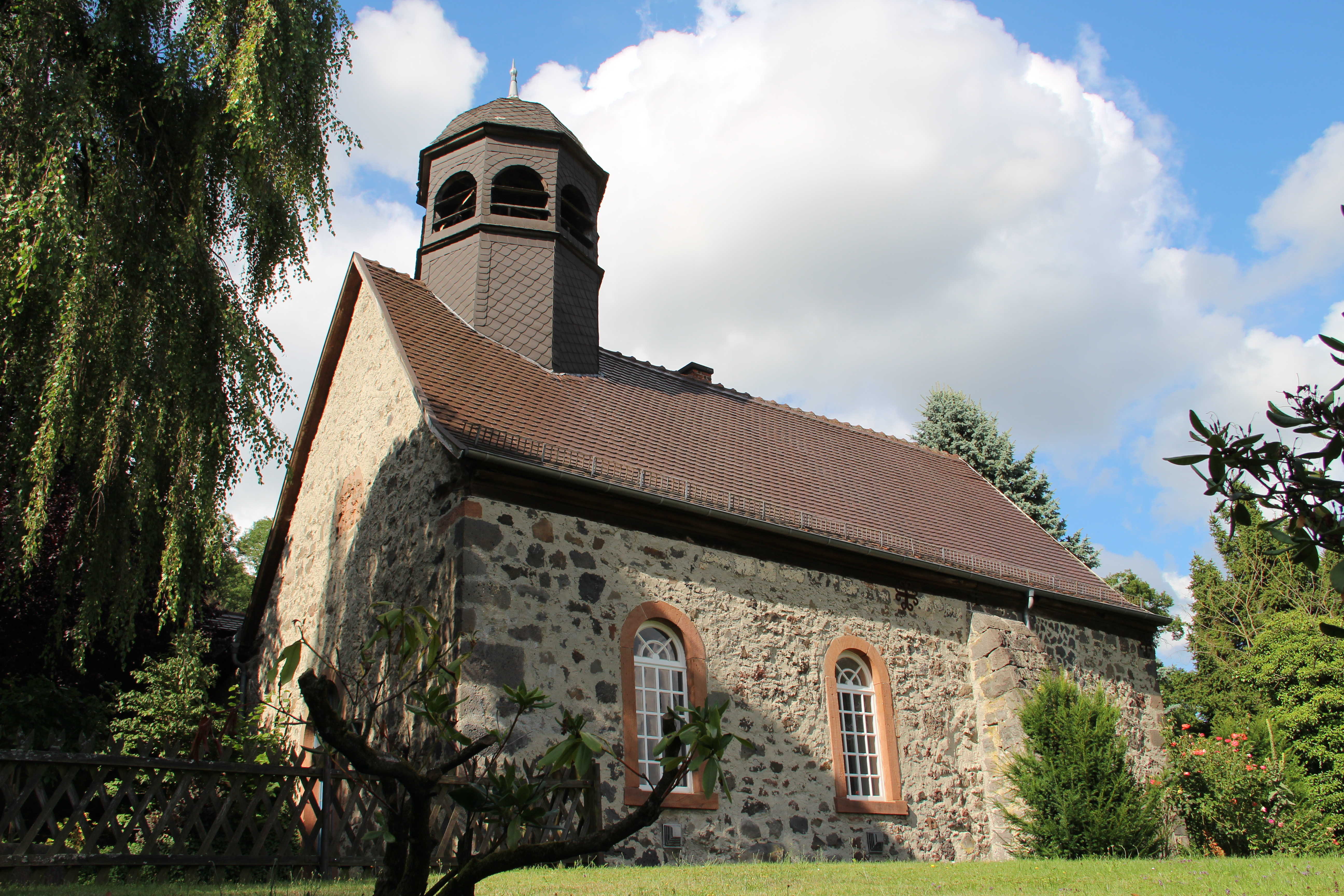 Nordecker Burgkapelle